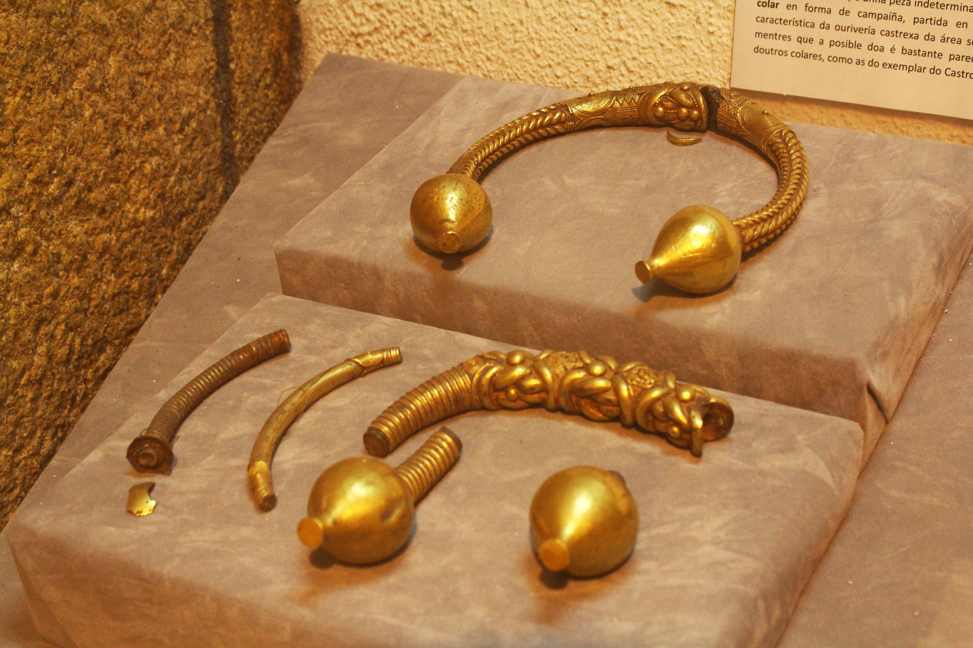 Castillo de San Antón, de finales del siglo XVI, en La Coruña.